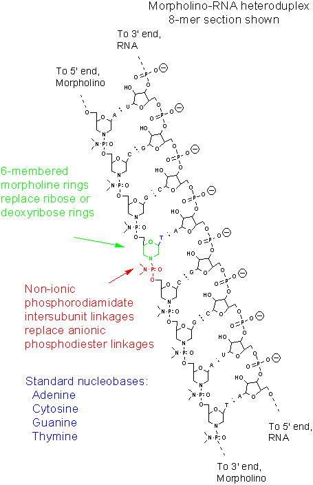 Interaction d'un hétéroduplex morpholino avec l'ARN